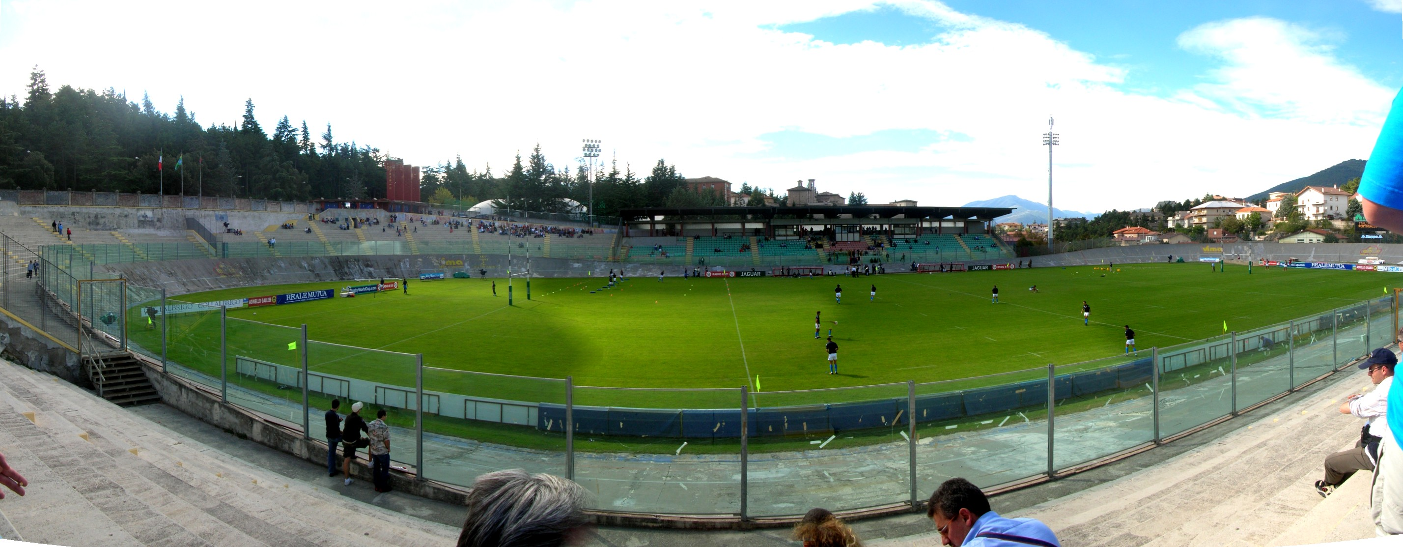 Tommaso Fattori Stadium, L'Aquila, Italy